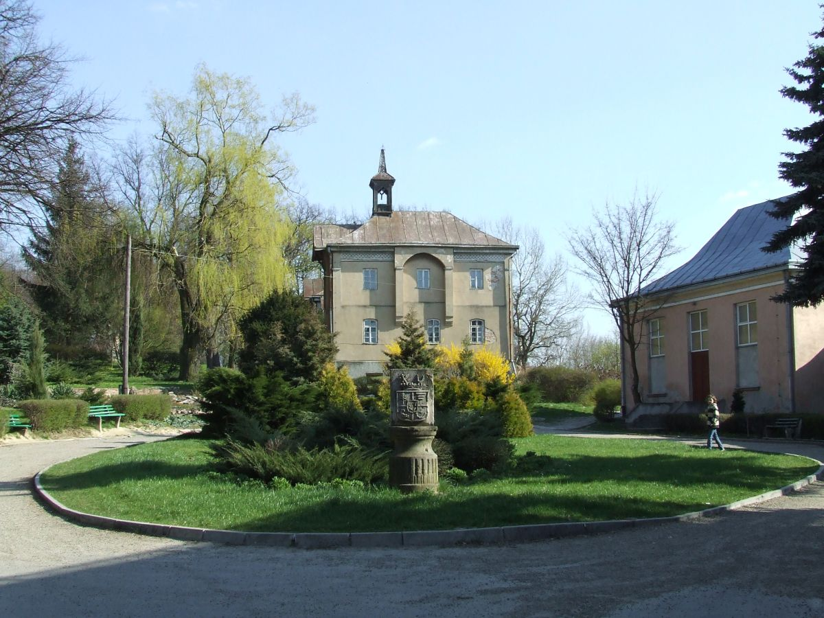 Pałac w Pawłosiowie, gm. Pawłosiów, pow. jarosławski, woj. podkarpackie